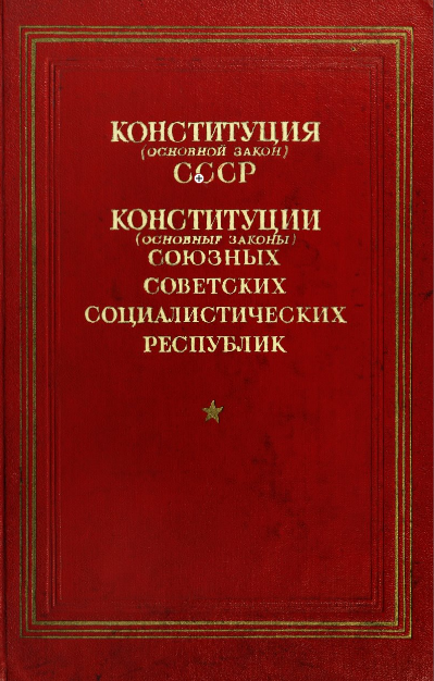 Конституция (Основной закон) СССР; Конституции (Основные законы) союзных советских социалистических республик